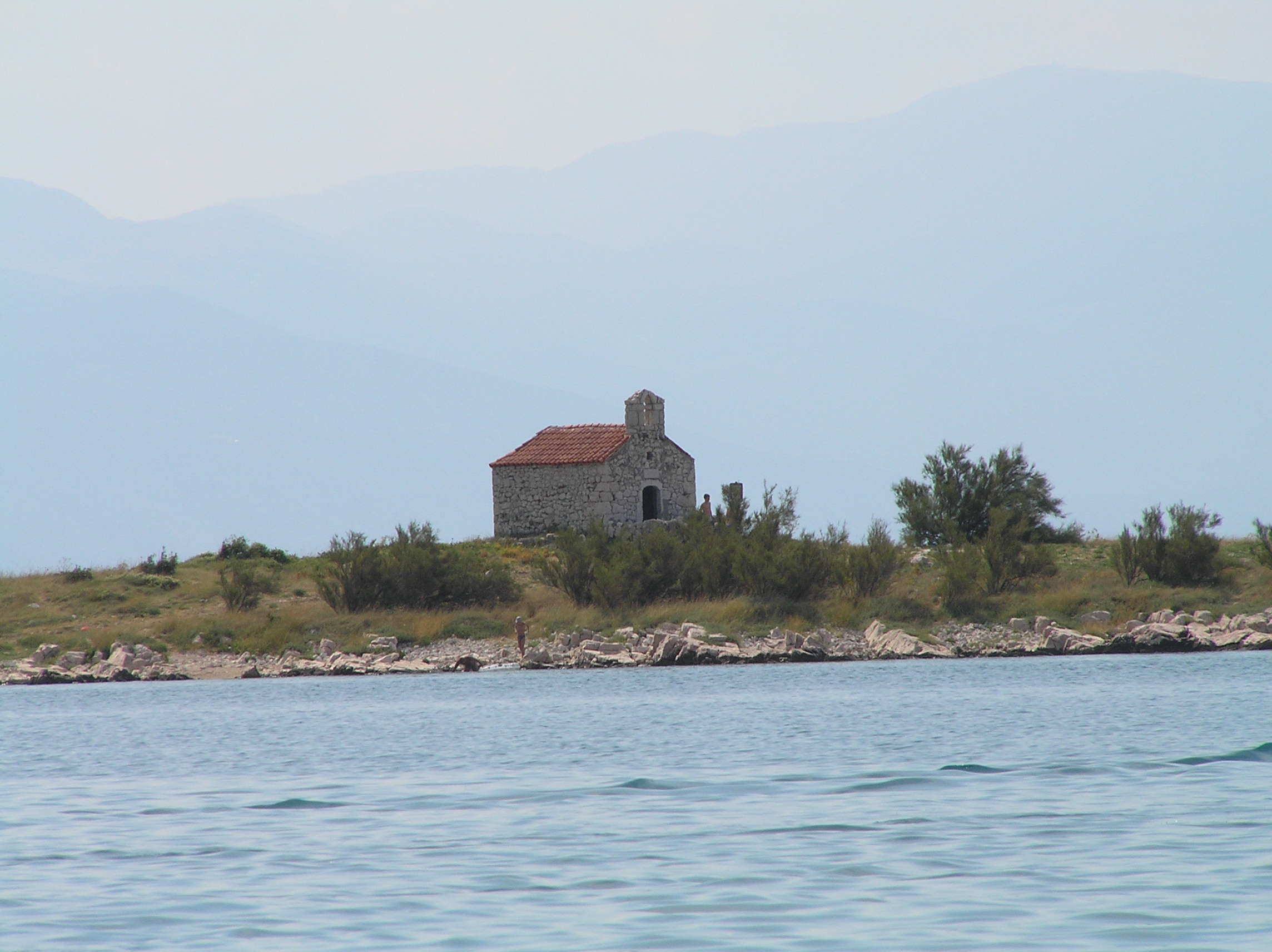 Novi Vinodolski - otok